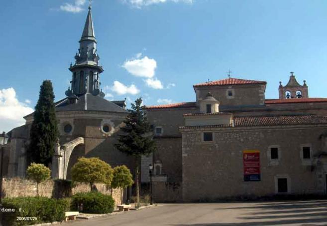 Santuari de San Pedro Regalado a La Aguilera (Burgos), amb la tomba del sant.